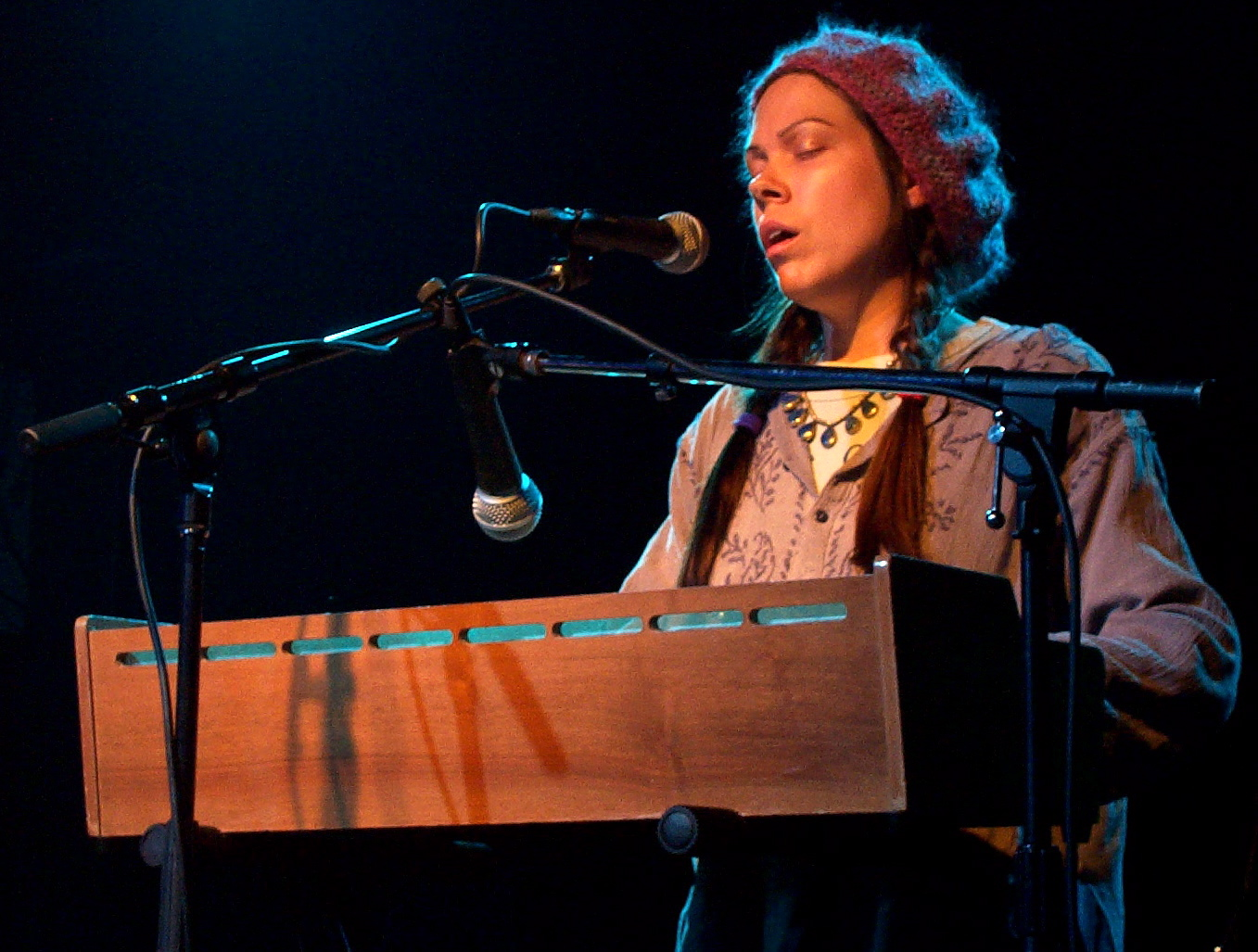 Tara Burke